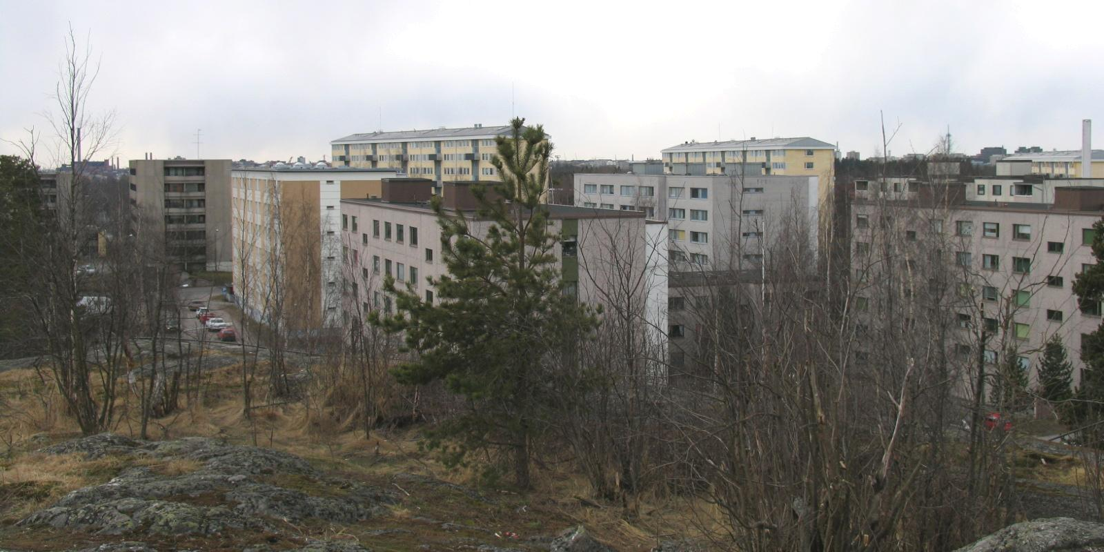 Koskela wieved from North-East. Koskela, Helsinki / Finland